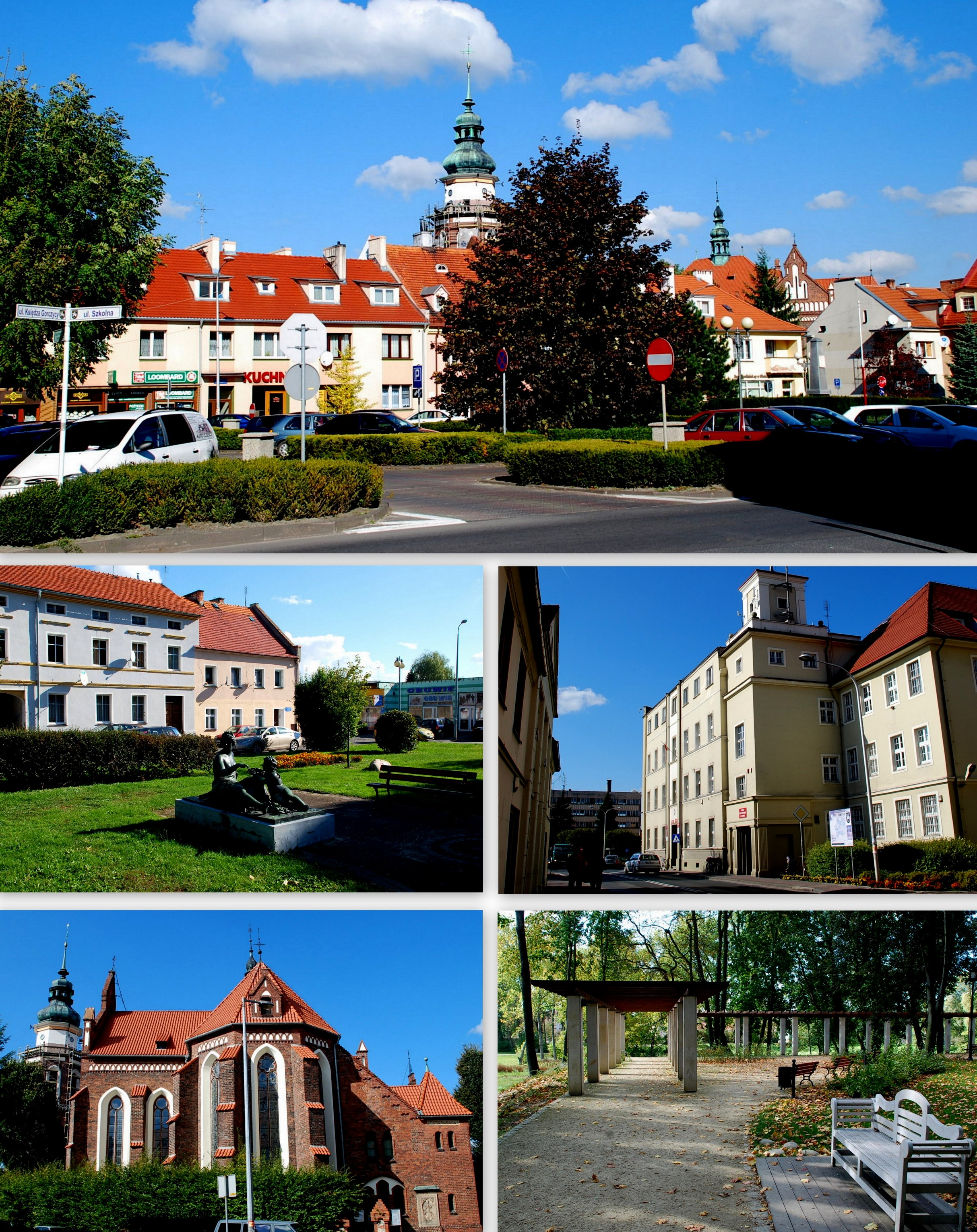 Rynek, Plac Wolności, Urząd Miasta i Gminy, Kościół rzymskokatolicki, Park pałacowy